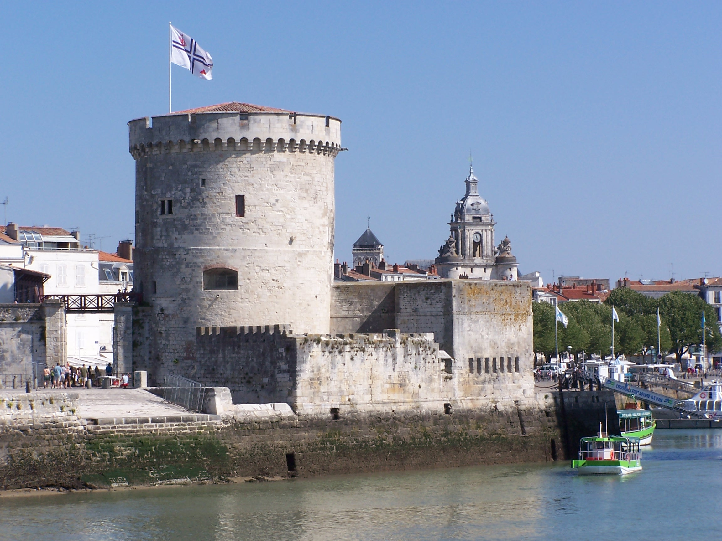 Photographie de la tour de la Chaîne, qui est, avec la tour Saint-Nicolas et la tour de la Lanterne, l'une des trois tours du front de mer de La Rochelle, et l'une des deux tours emblématiques du Vieux-Port. Elle a été classée monument historique en 1879.